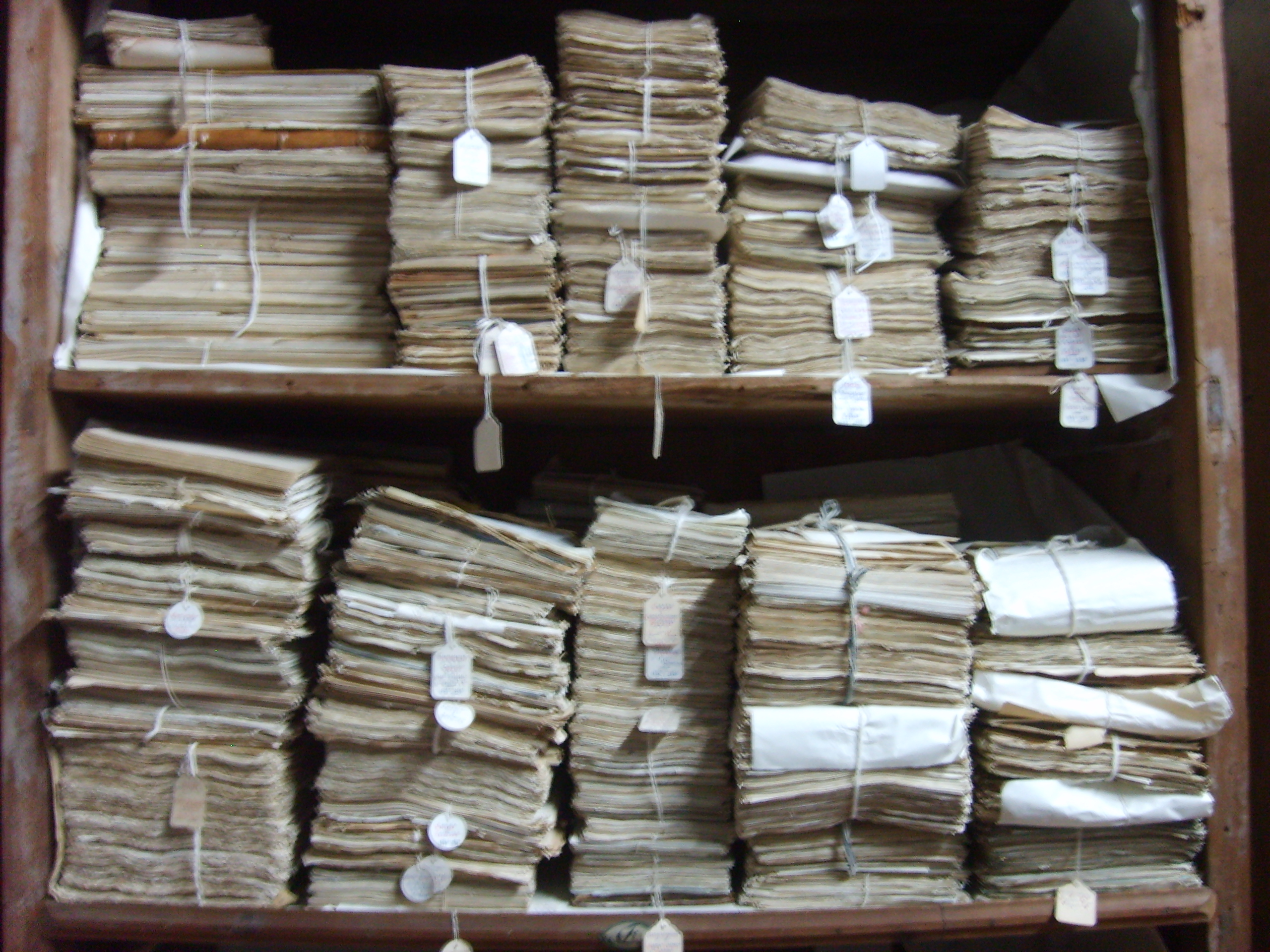 Sección del archivo de la Catedral de Puebla — México.